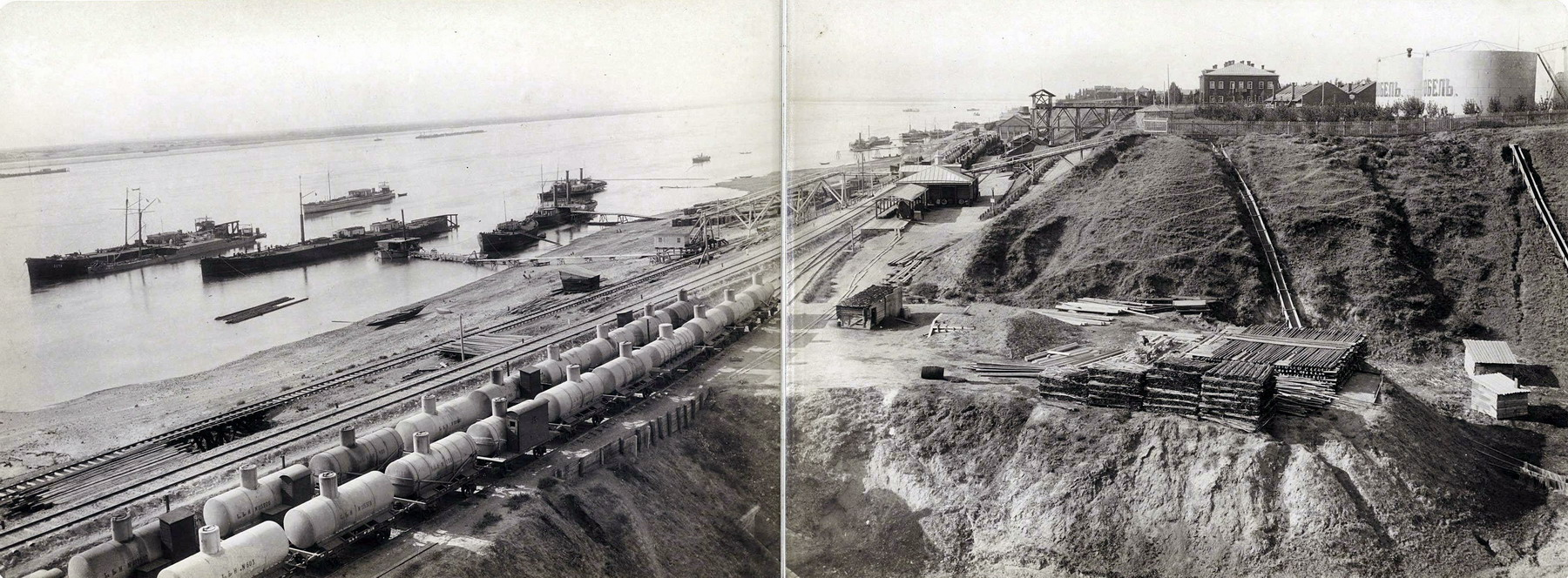 Нобелевский городок в Царицыне. Начало 1880-х гг.